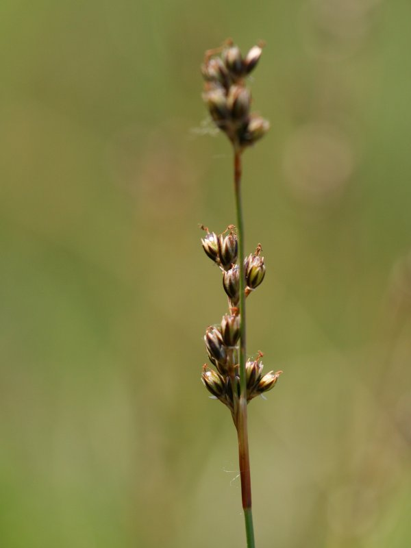 Sparrige Binse (Juncus squarrosus)